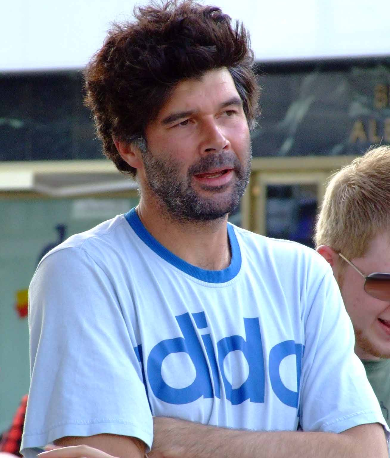 Tommy Wosch während einer Live-Sendung auf dem Alexanderplatz in Berlin